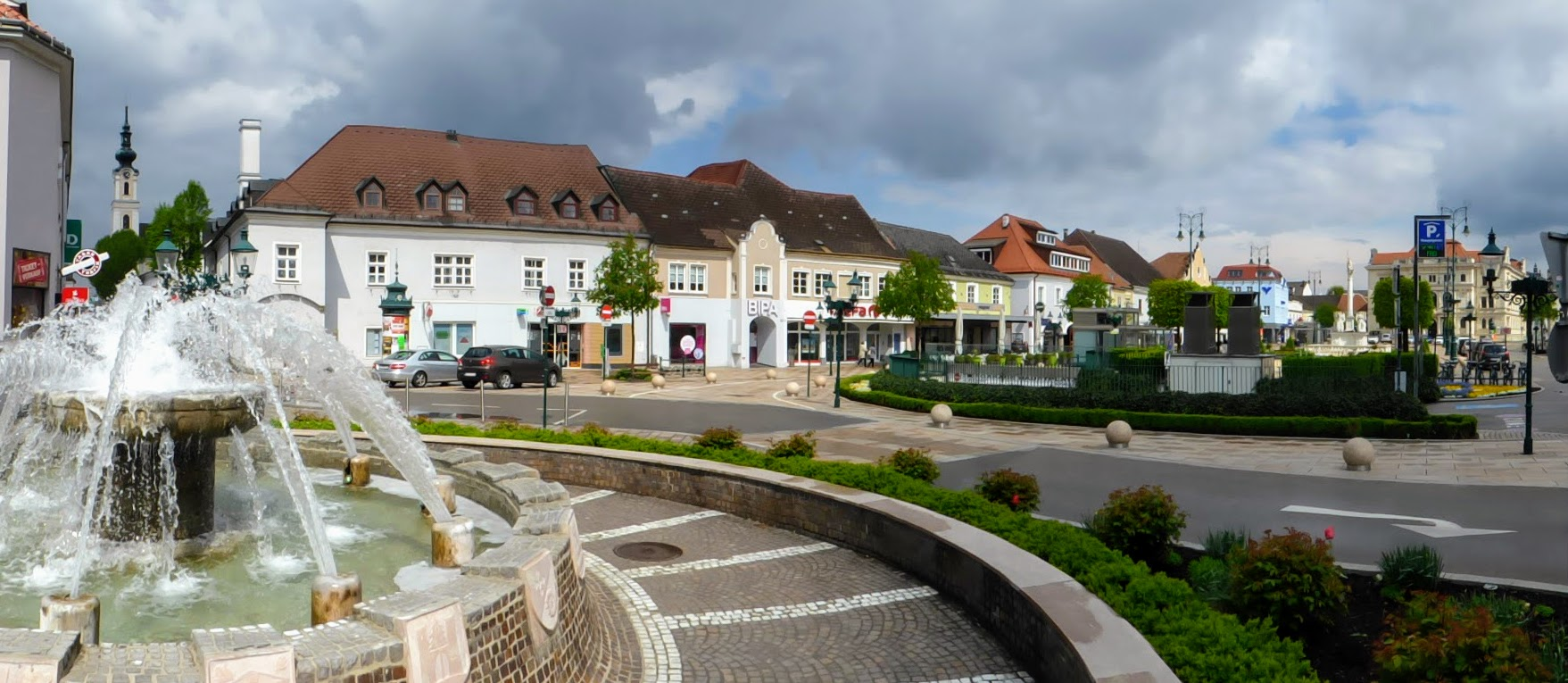 Hauptplatz der Stadt Tulln, Niederösterreich. Links im Vordergrund der Bezirksbrunnen. Ganz links im Hintergrund: Turm der Minoritenkirche. Rechts im Hintergrund die Pestsäule, dahinter ganz rechts das Amtsgebäude der Bezirkshauptmannschaft.